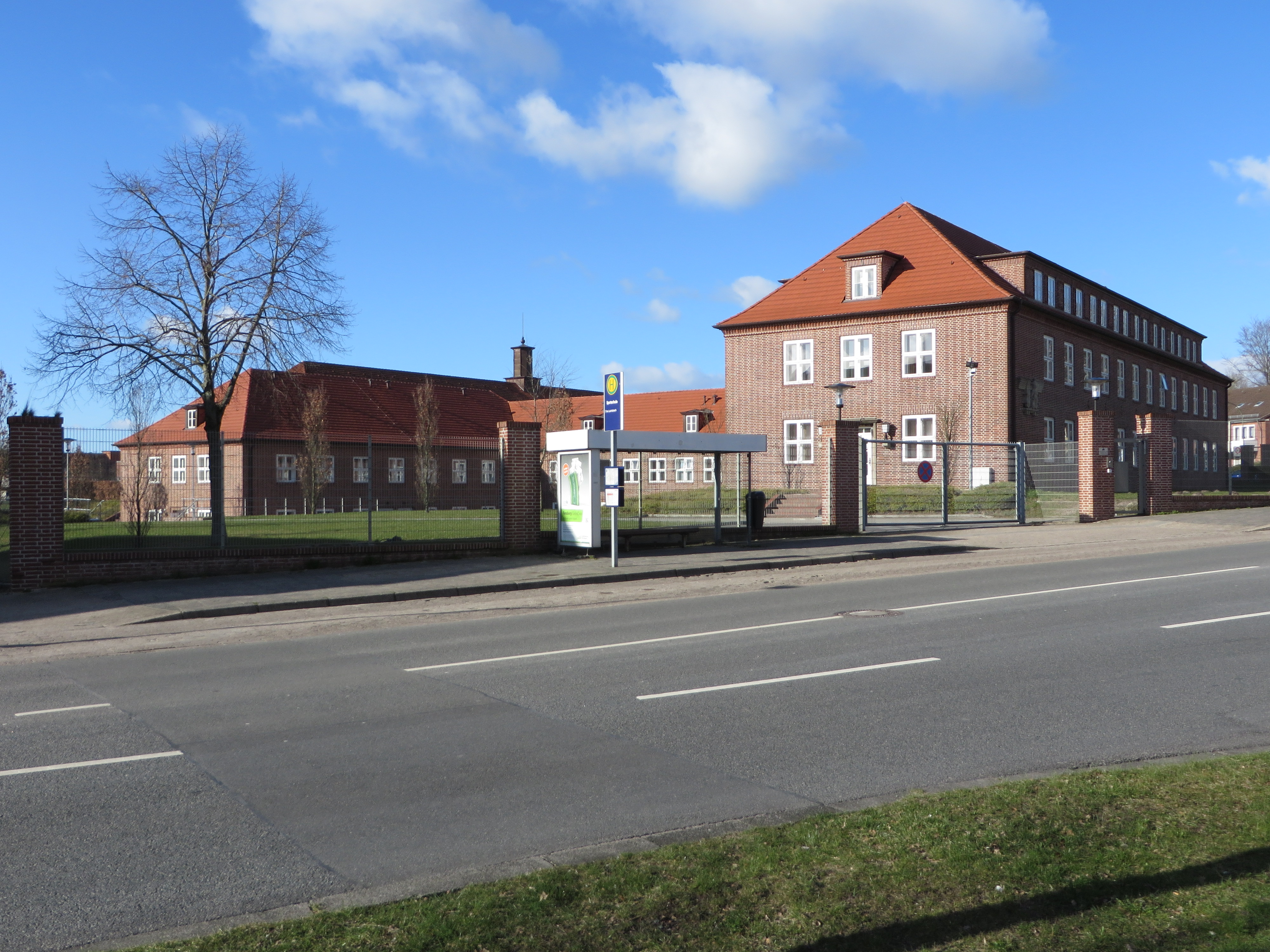 Marinesportschule (Flensburg-Mürwik April 2015), Bild 02